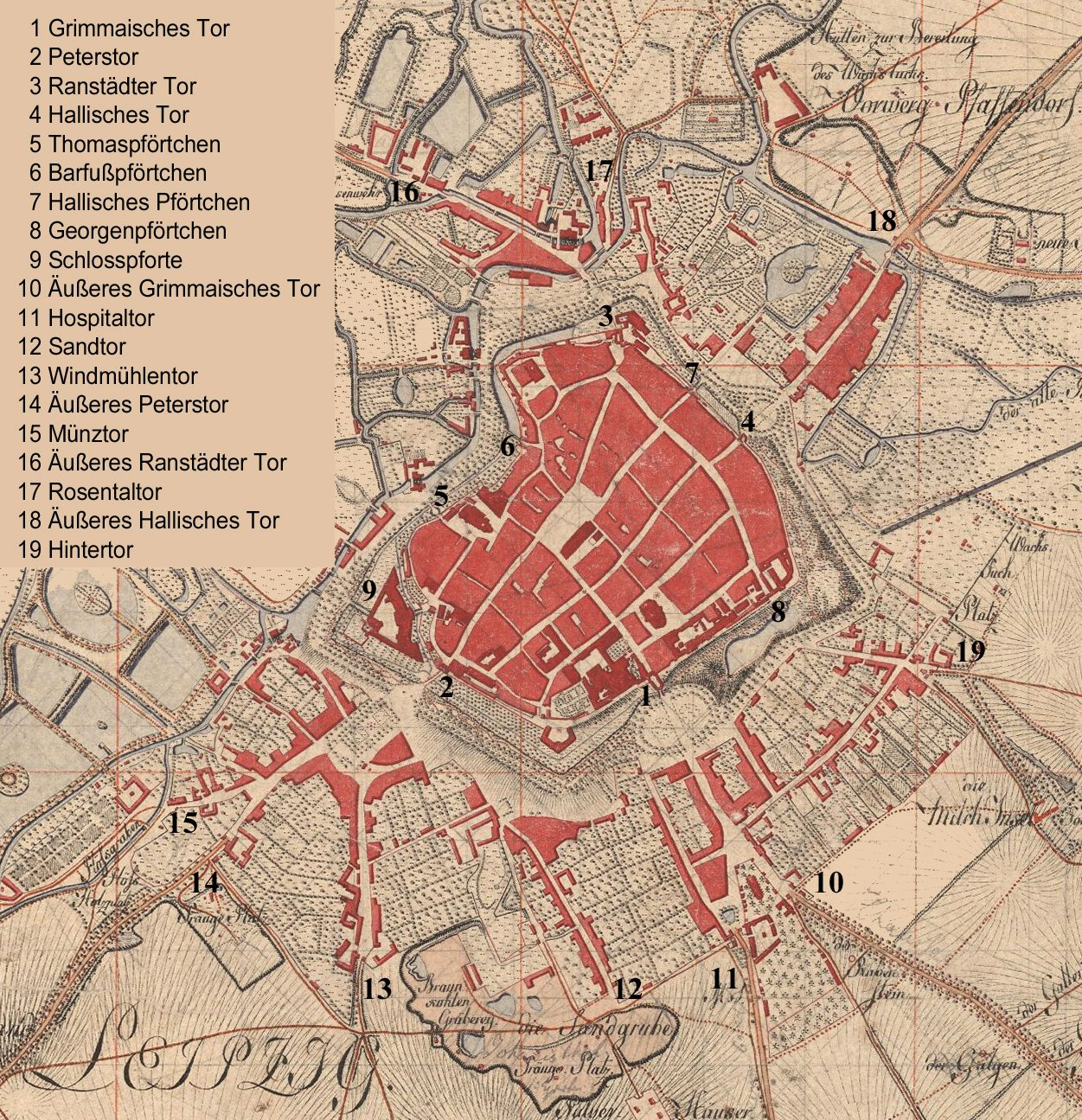 Die Lage der Leipziger Stadttore, dargestellt auf einer Karte von 1800 (Sächsische Meilenblätter aus der SLUB Dresden)